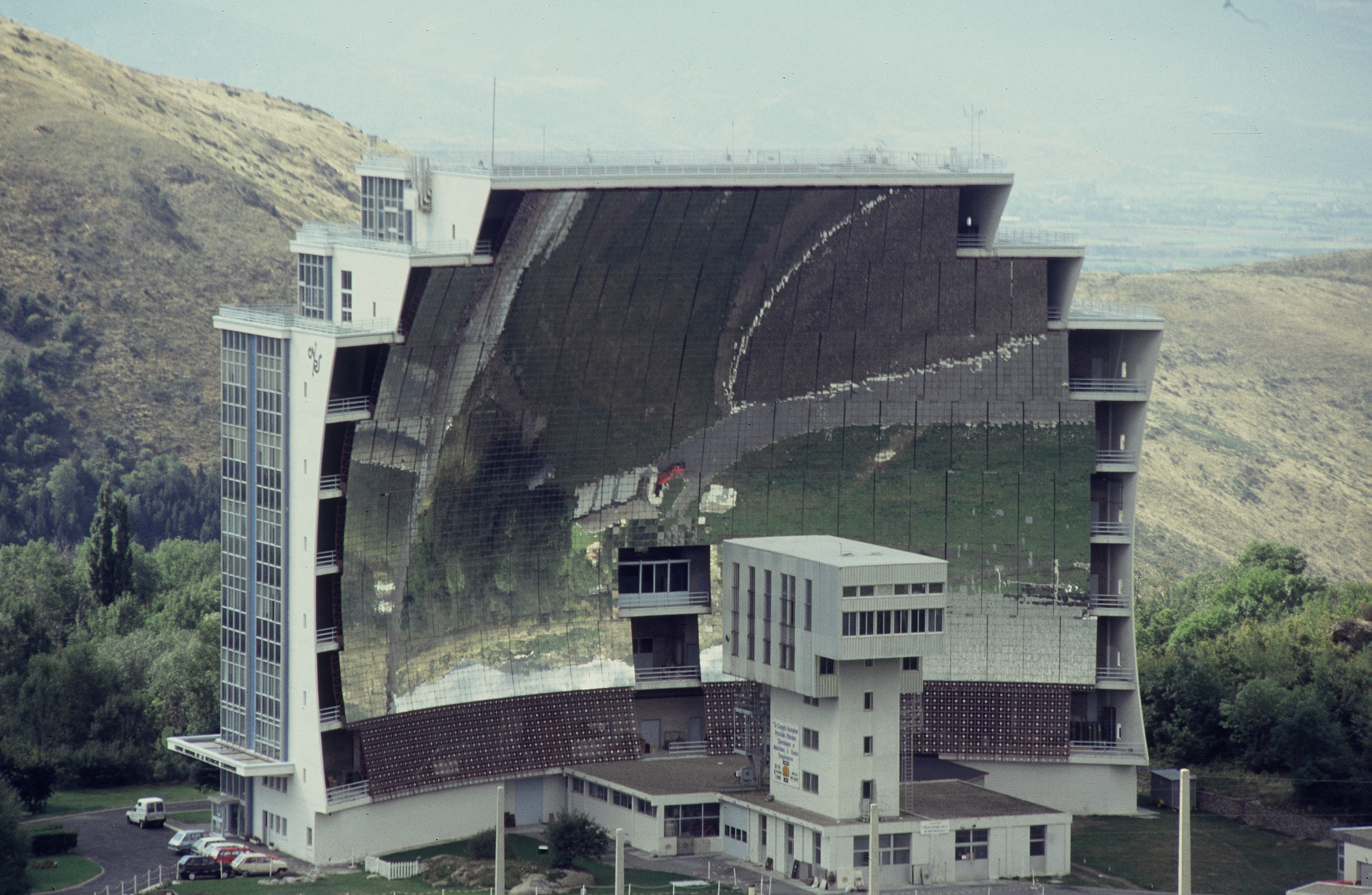 Horno solar de Font-Romeu en Odeillo